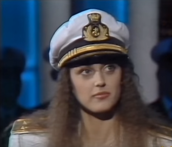 TV show Fantastico